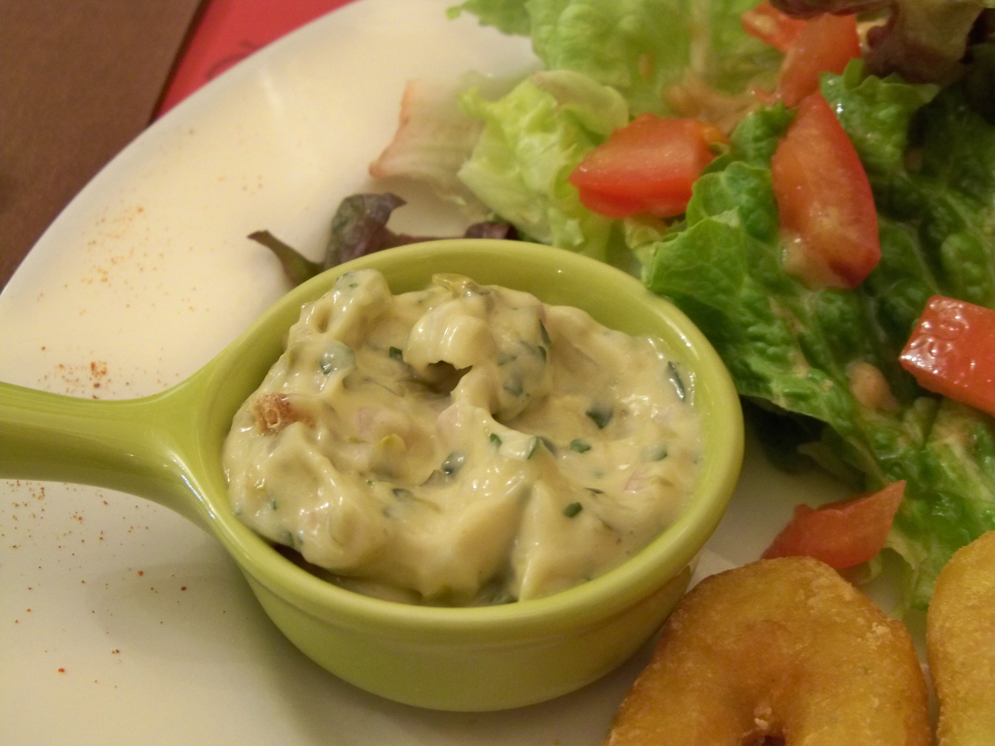 Sauce Béarnaise